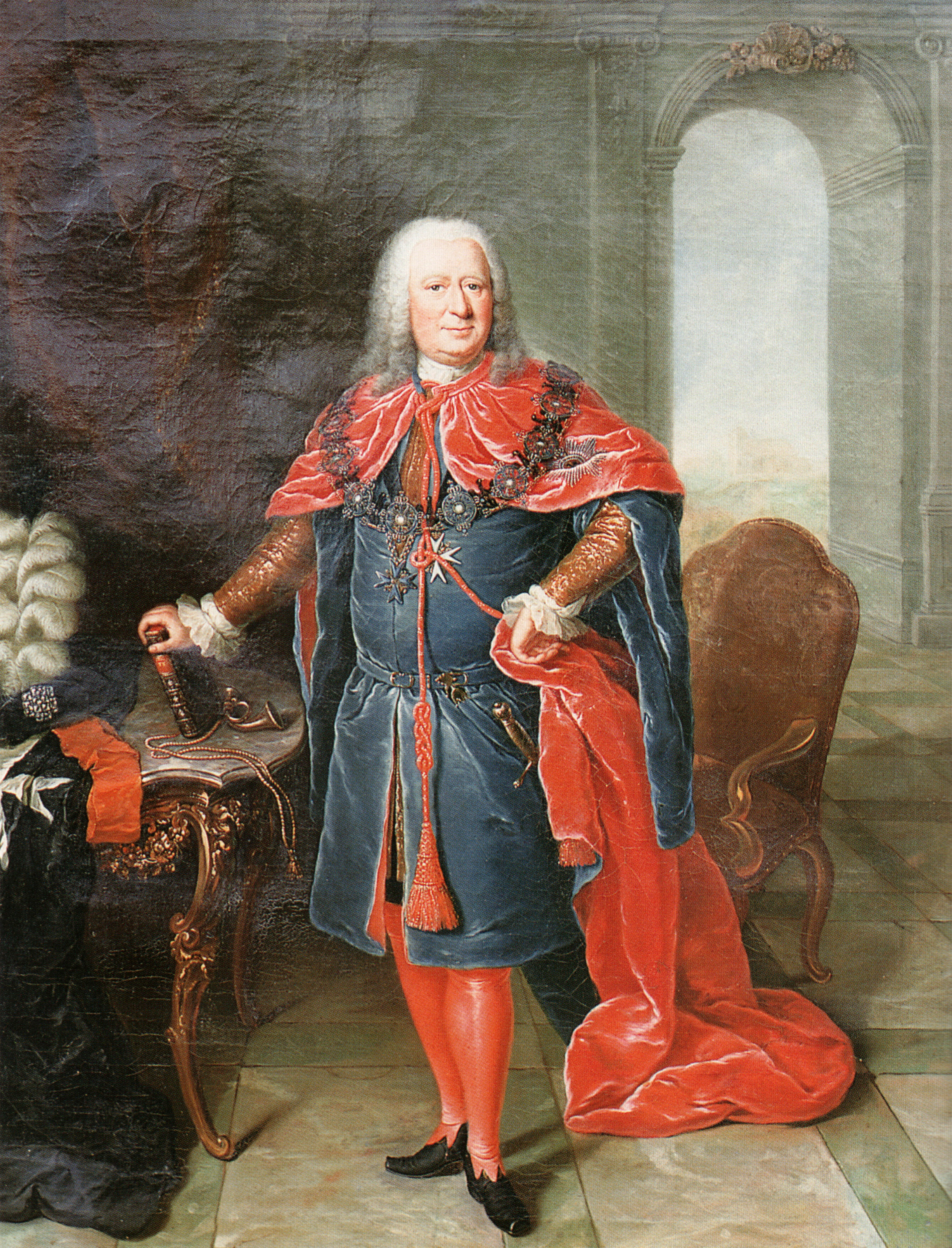 Georg Dietloff von Arnim